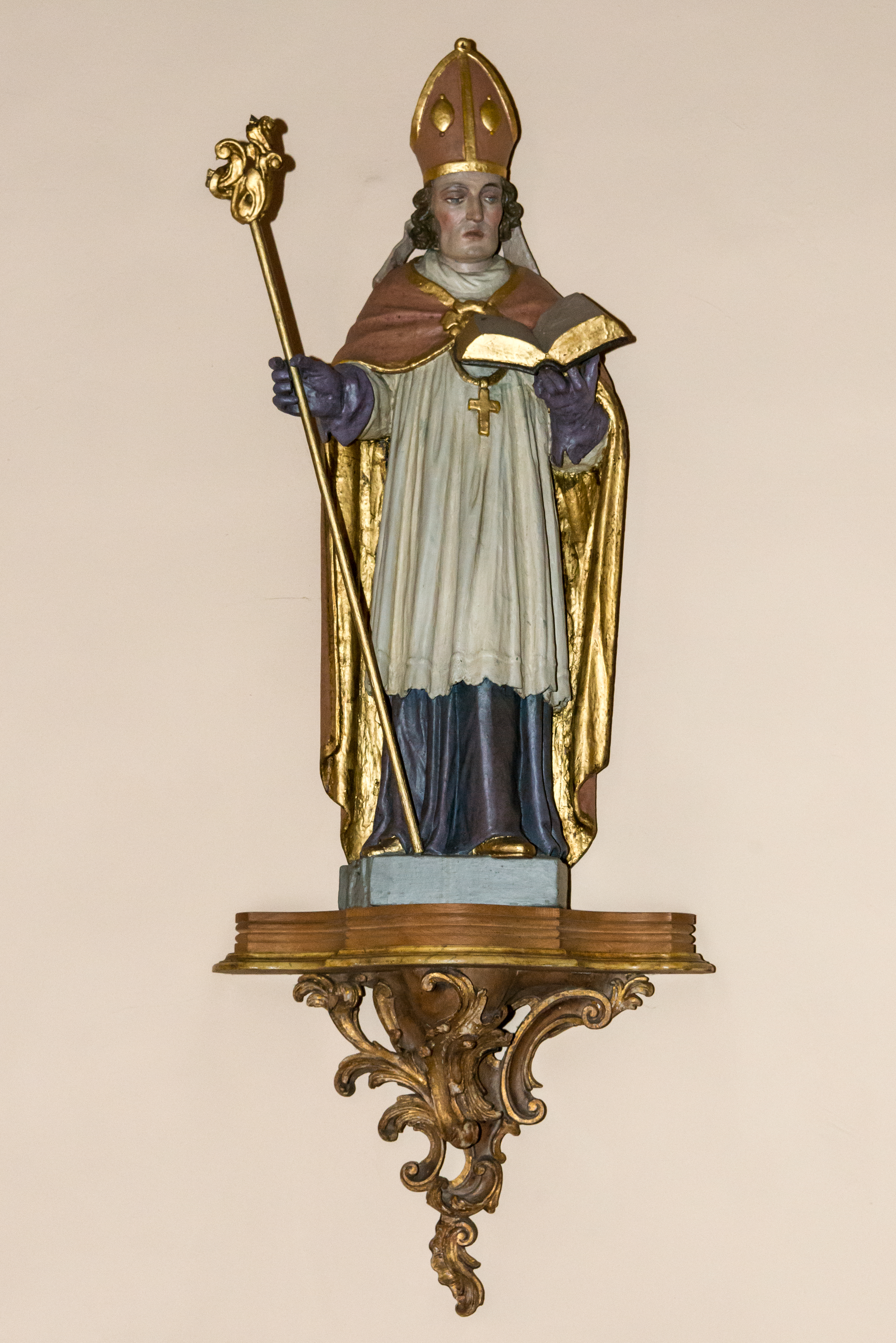 Celsus-vun-Tréier-Statu an der Bricher Kierch.